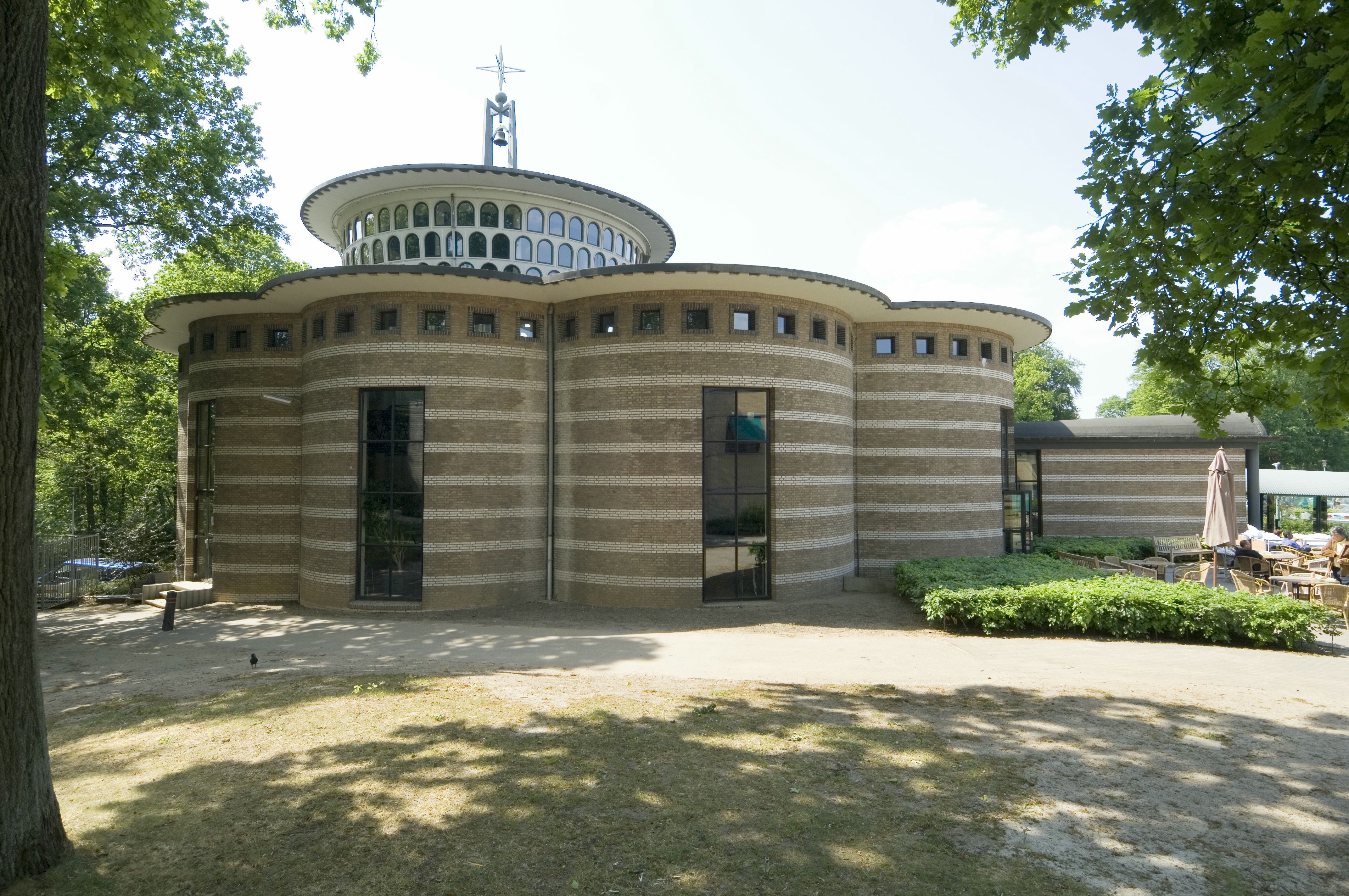 Sint Maartenskliniek: Aanzicht vanuit het noordoosten